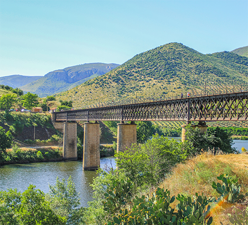 Puente internacional del ferrocarril de La Fregeneda sobre el río Águeda, en la provincia de Salamanca, Castilla y León, España. En frente Barca d'Alva, Portugal.